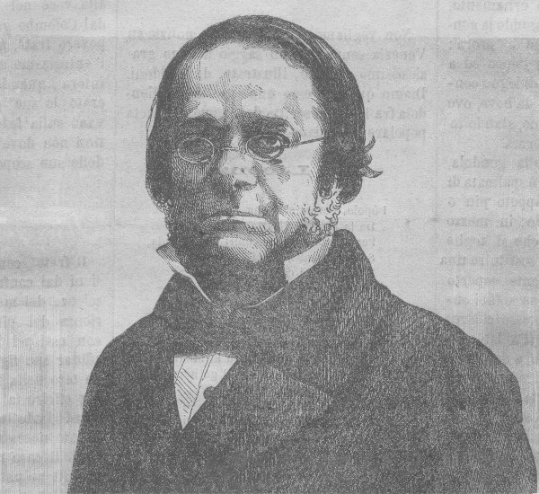 Ritratto di Daniele Manin - Xilografia pubblicata nel 1865